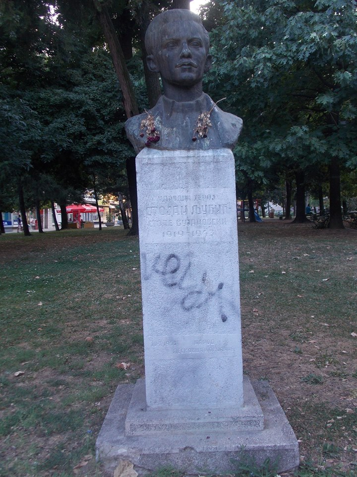 Биста Стојана Љубића у Лесковцу